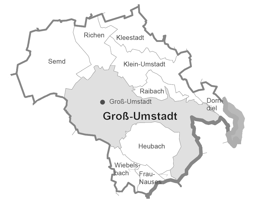 Gemarkung der Kernstadt der Stadt Groß-Umstadt, entspricht Gemarkung vor der Eingemeindung der Ortsteile. Die Daten basieren auf der Verwaltungskarte von Hessen (Hessisches Landesamt für Bodenmanagement und Geoinformation, 2009.)